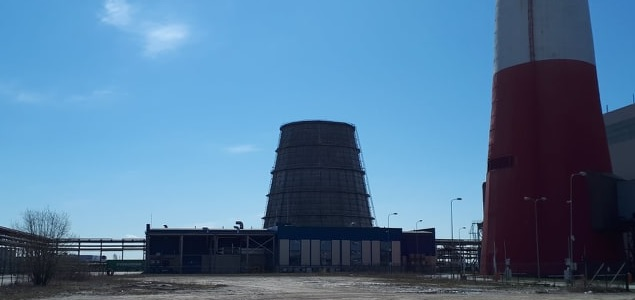 AS E.R.S.`i Maardu depoohoone Iru elektrijaama kõrval.